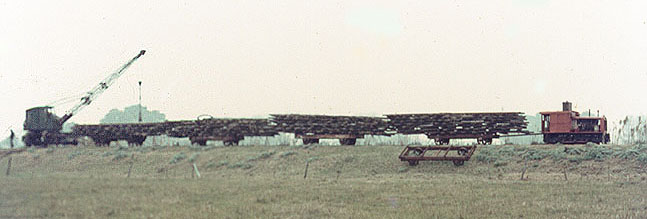 Tren de levante del Midland